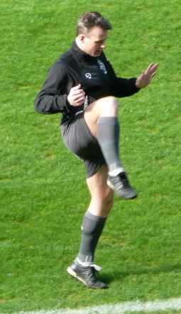 Björn Kuipers, Dutch referee.